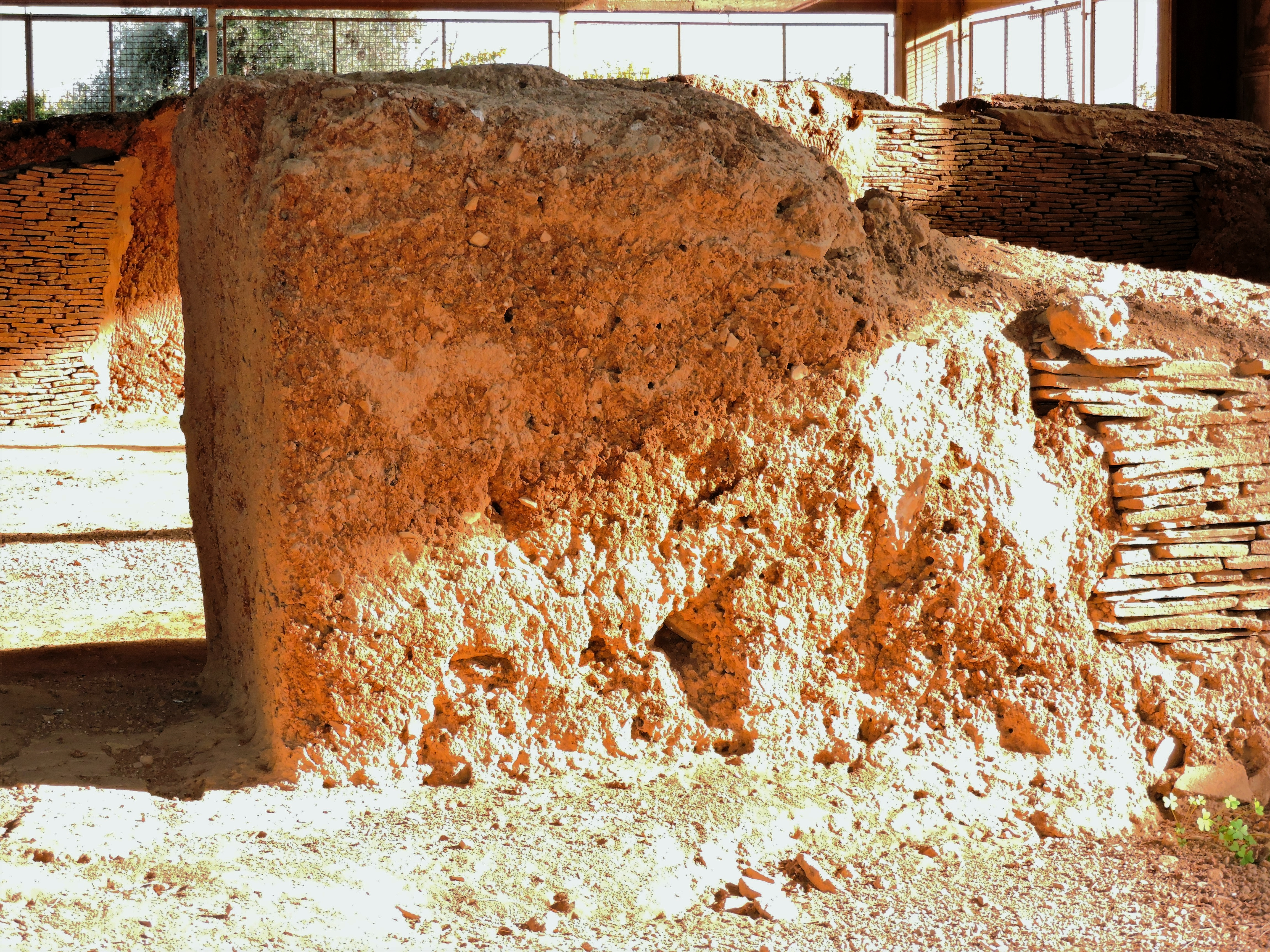 Λέρνα«Λέρνα»